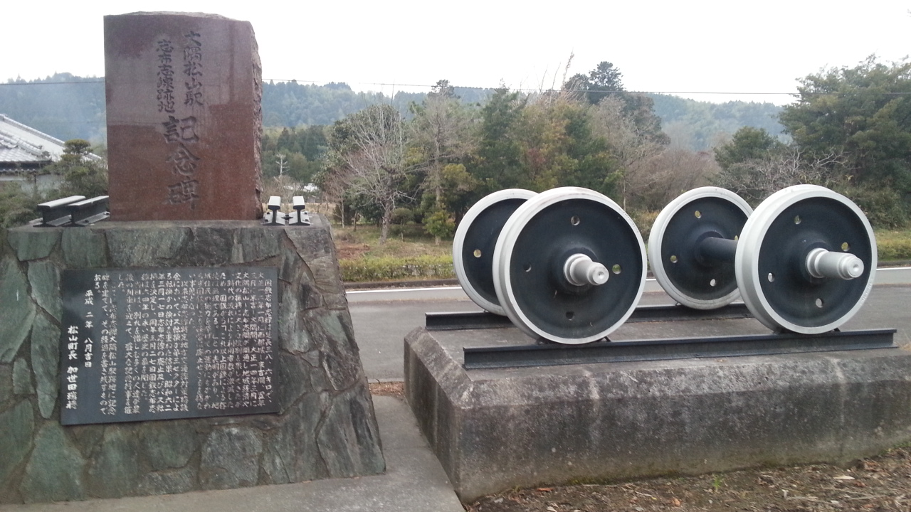 大隅松山駅跡記念碑 2012-12-27撮影